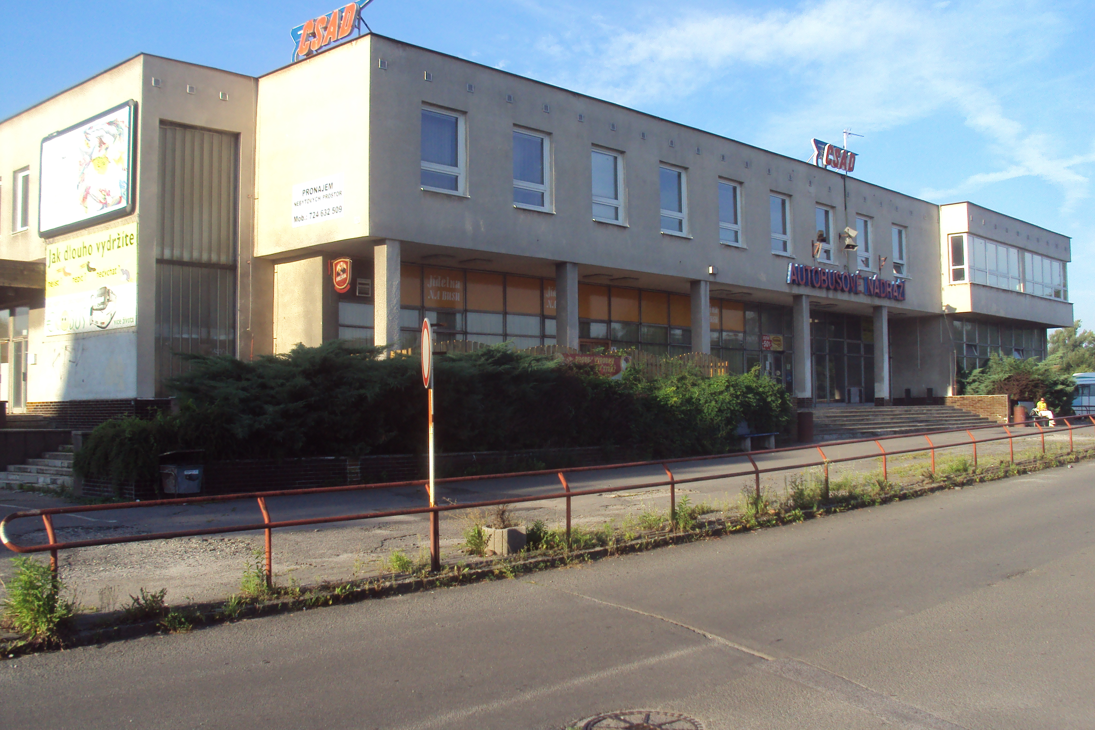 Budova autobusového nádraží v České Lípě